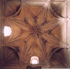 Boveda de la capilla de la Concepción.